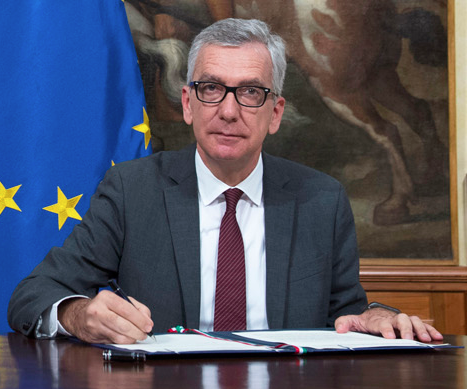 Presidente della Regione Sardegna Francesco Pigliaru